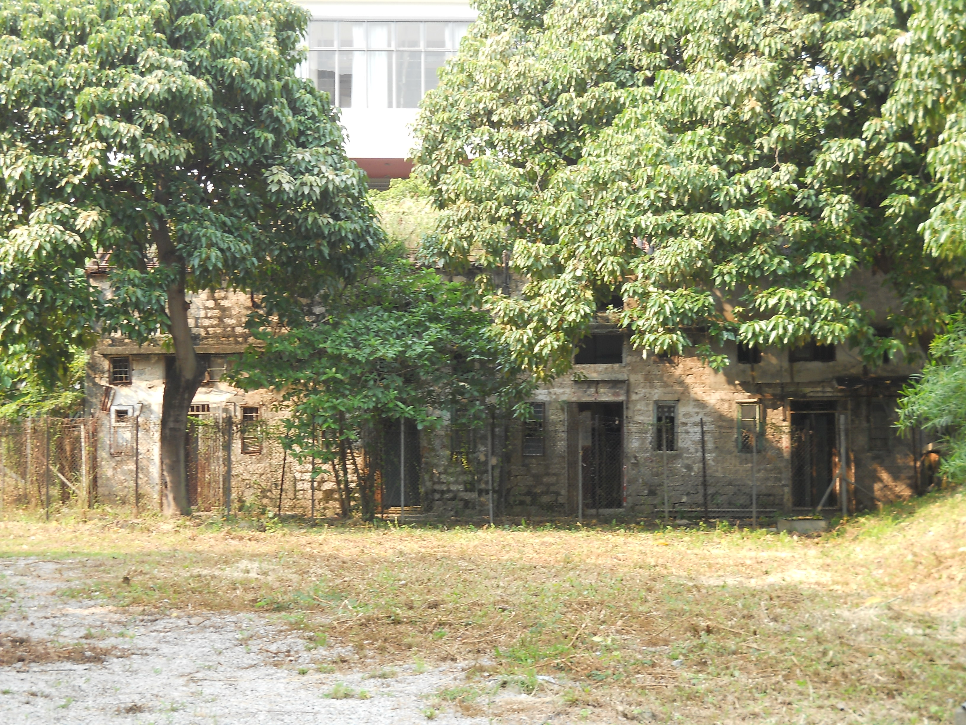 中文（香港）: 九龍城侯王廟新村31至35號舊民居